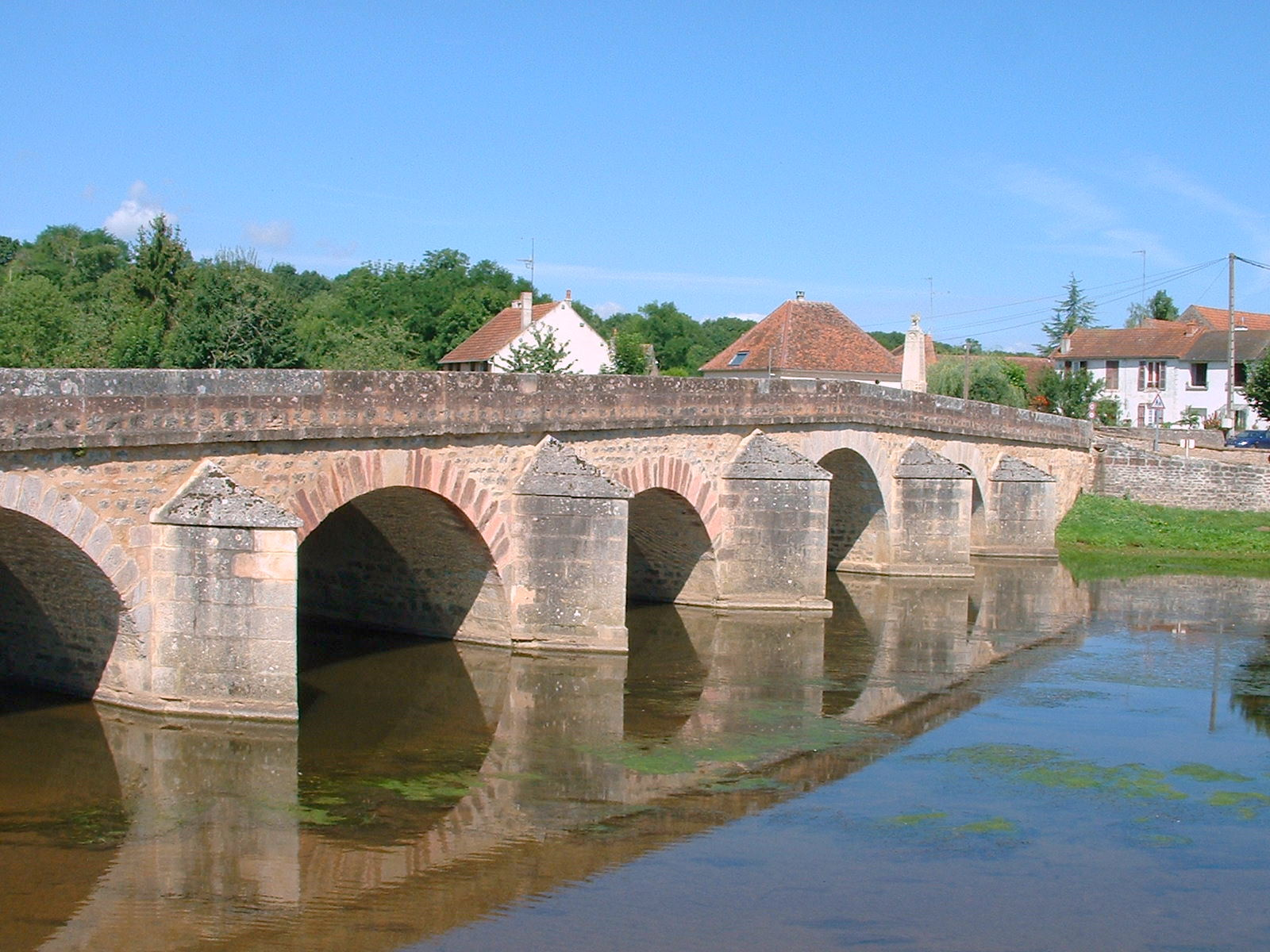 Guillon (Yonne) : le pont du XVIe siècle